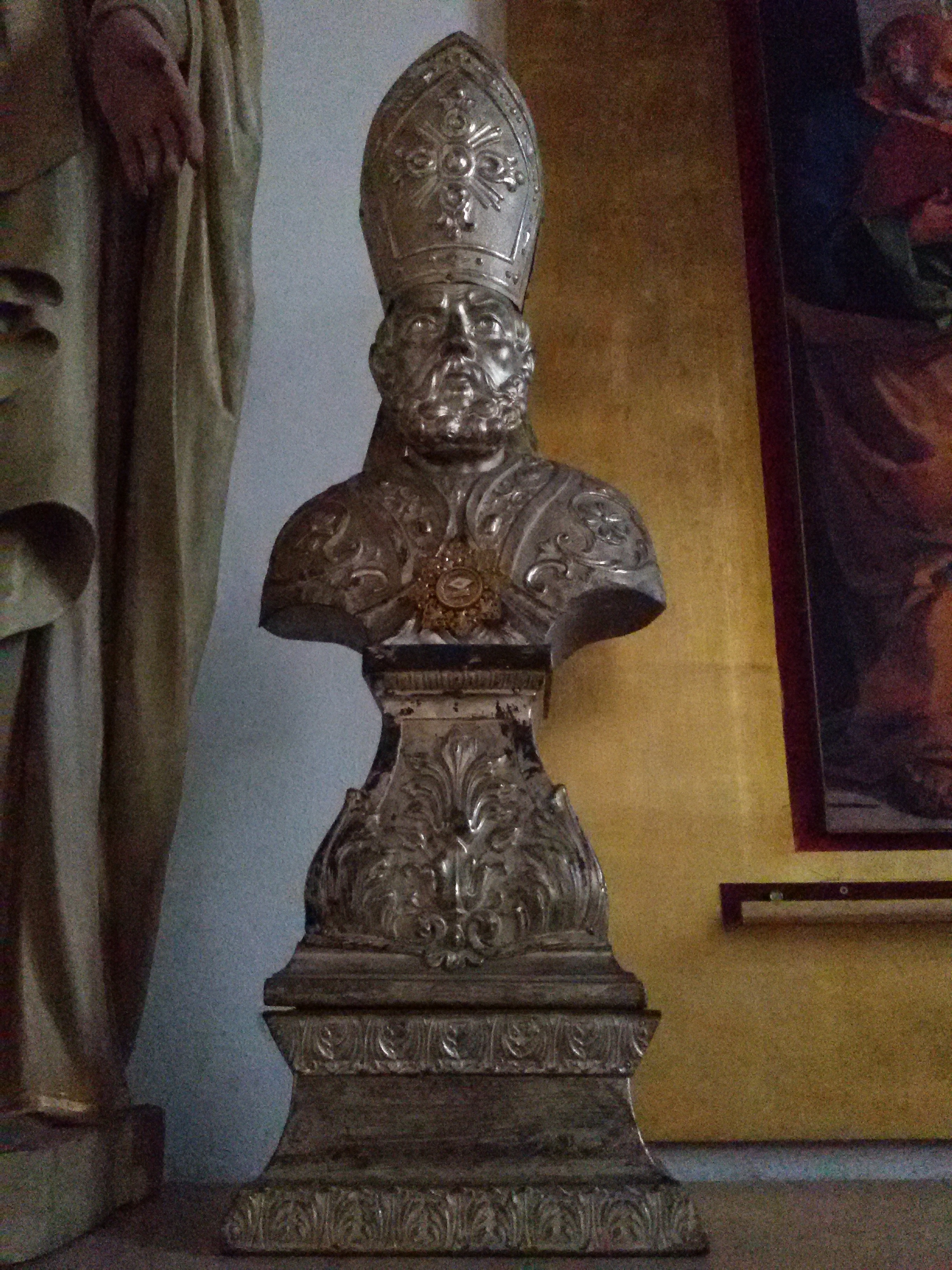 Chiesa di Santa Cristina Quinto di Treviso